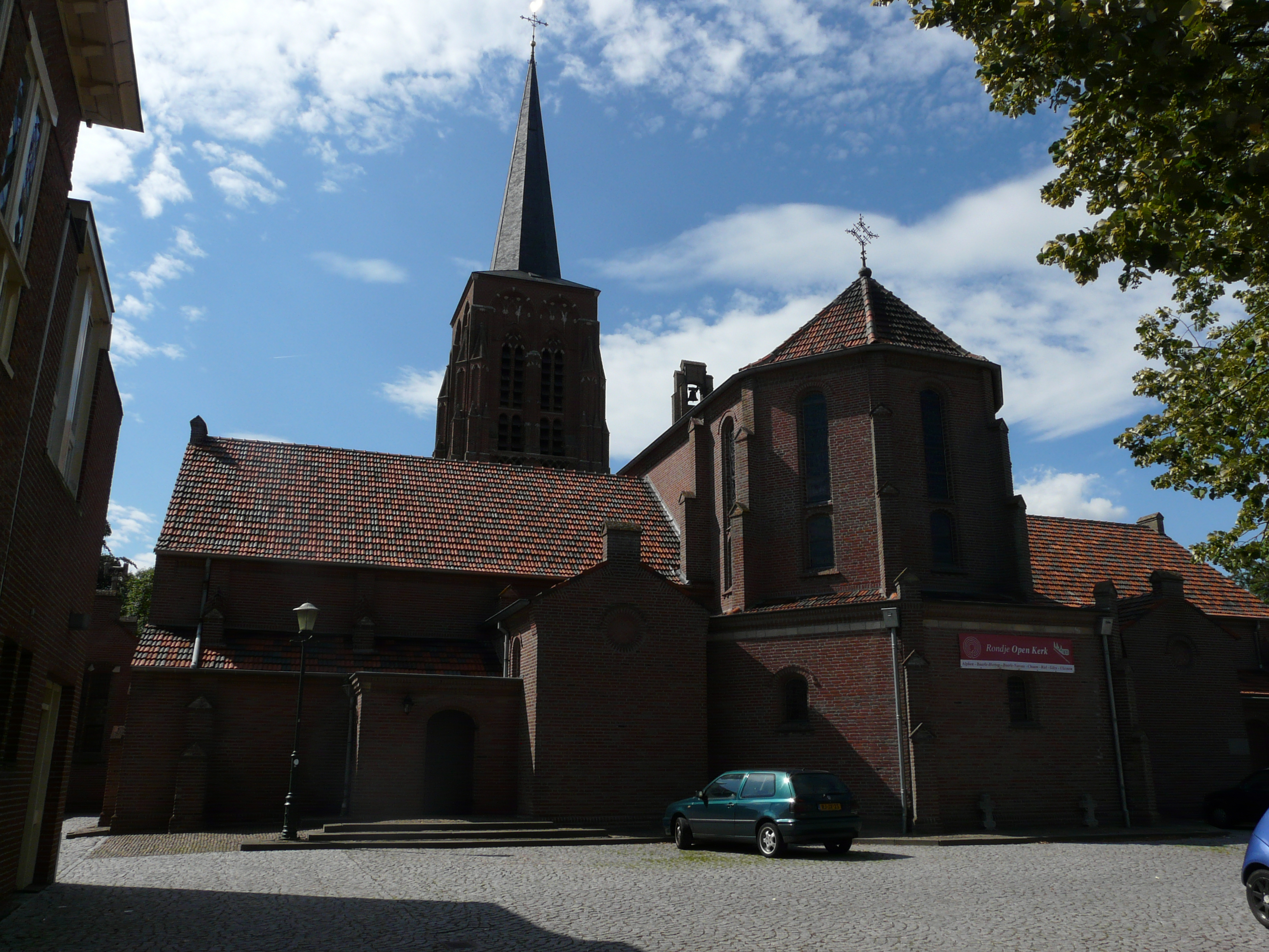 Sint-Willibrorduskerk (Alphen)